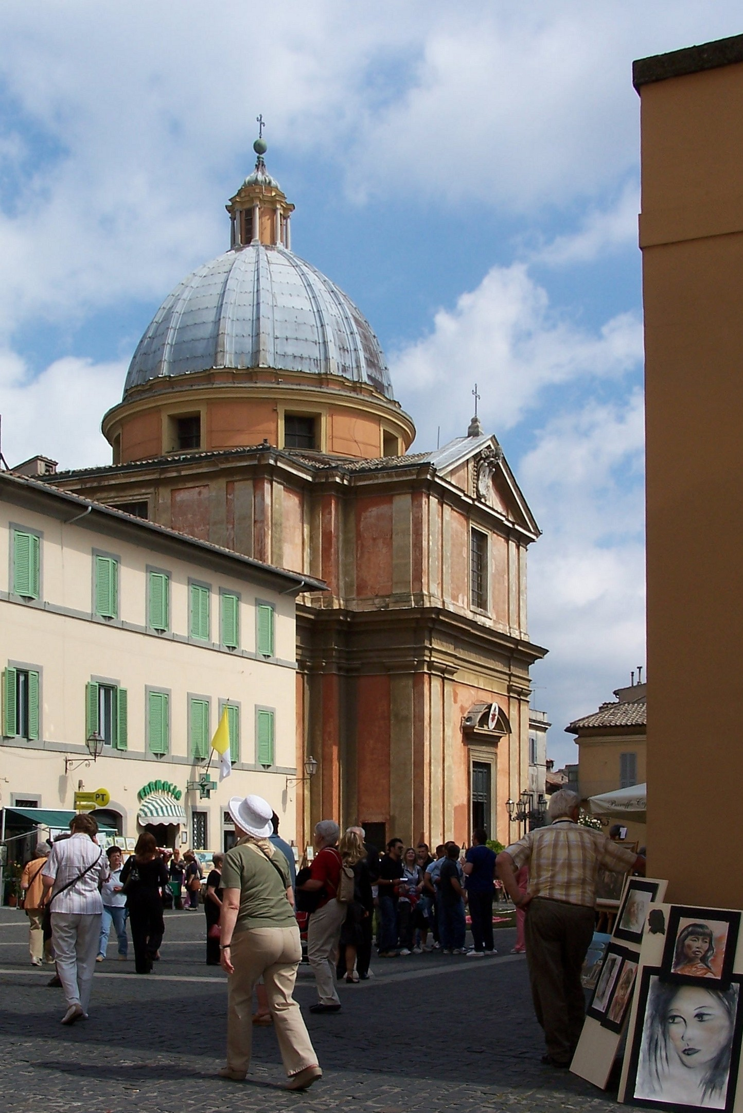 Castel Gandolfo, Kirche